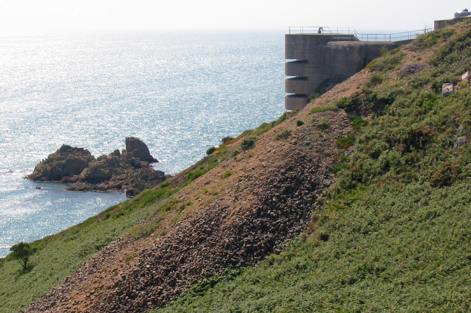 Nrf: Nièrmont, Saint Brélade, Jèrri, 24 dé Juilet 2009